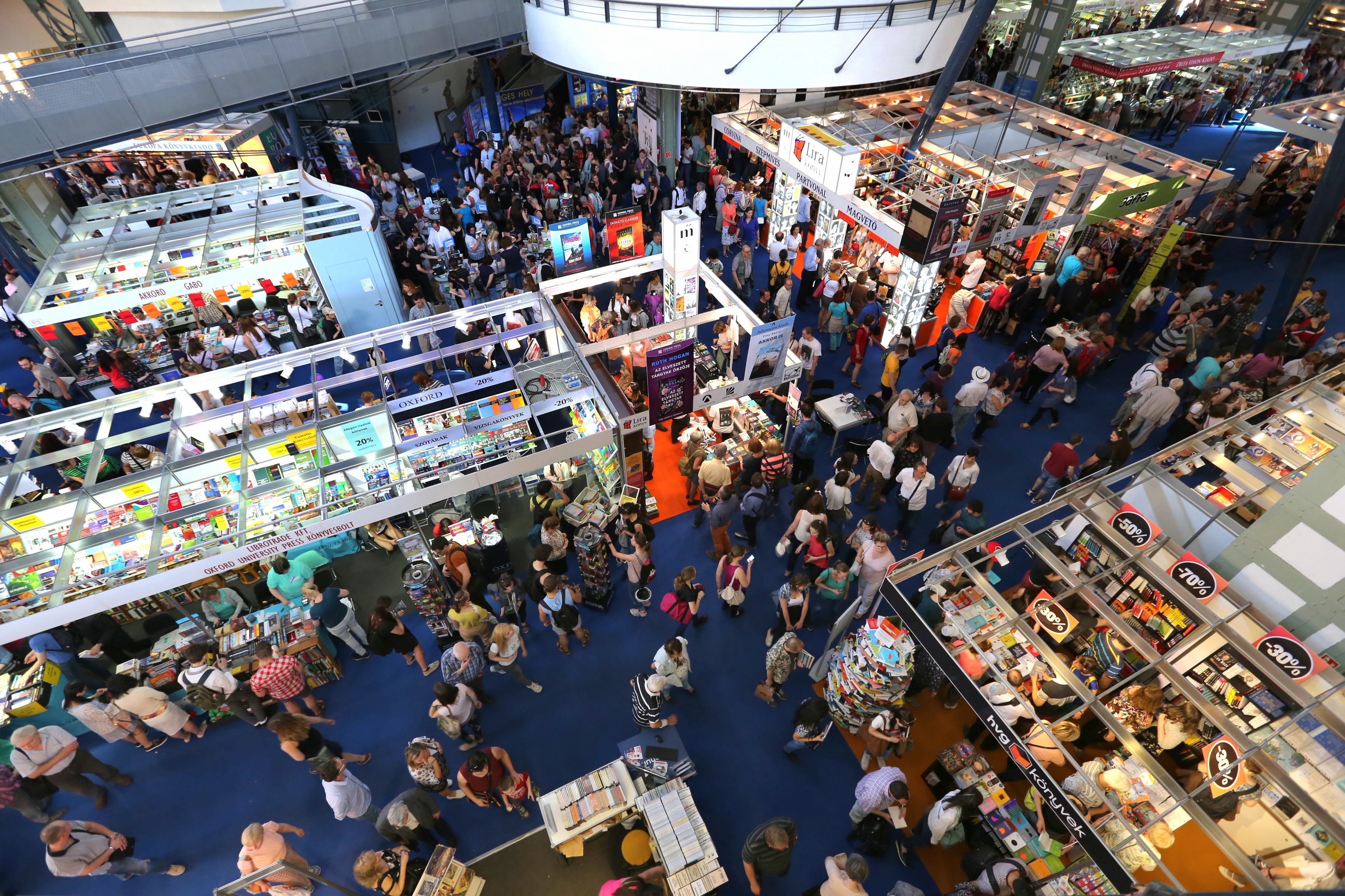 A 2018-as könyvfesztivál Bookfest Budapest